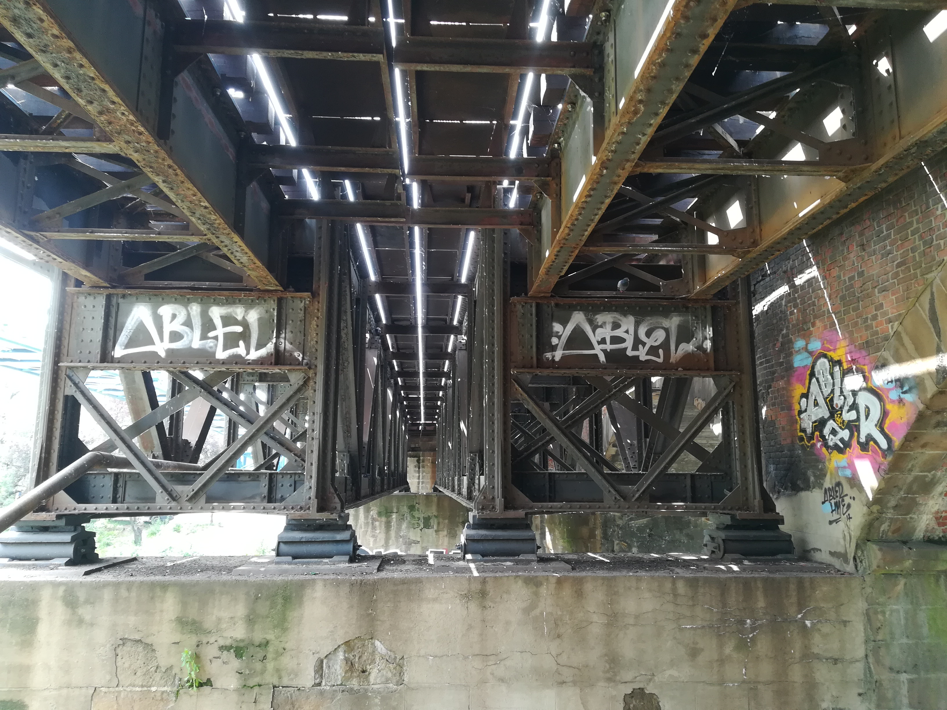 Brno - Vídeňský viadukt, příhradová část